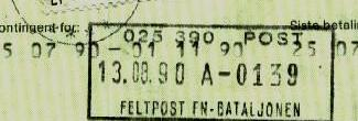 Eksempel på poststempler fra feltpost FN-bataljonen. Norske frimerker ble brukt på det norske feltpostkontoret i Sør-Libanon.